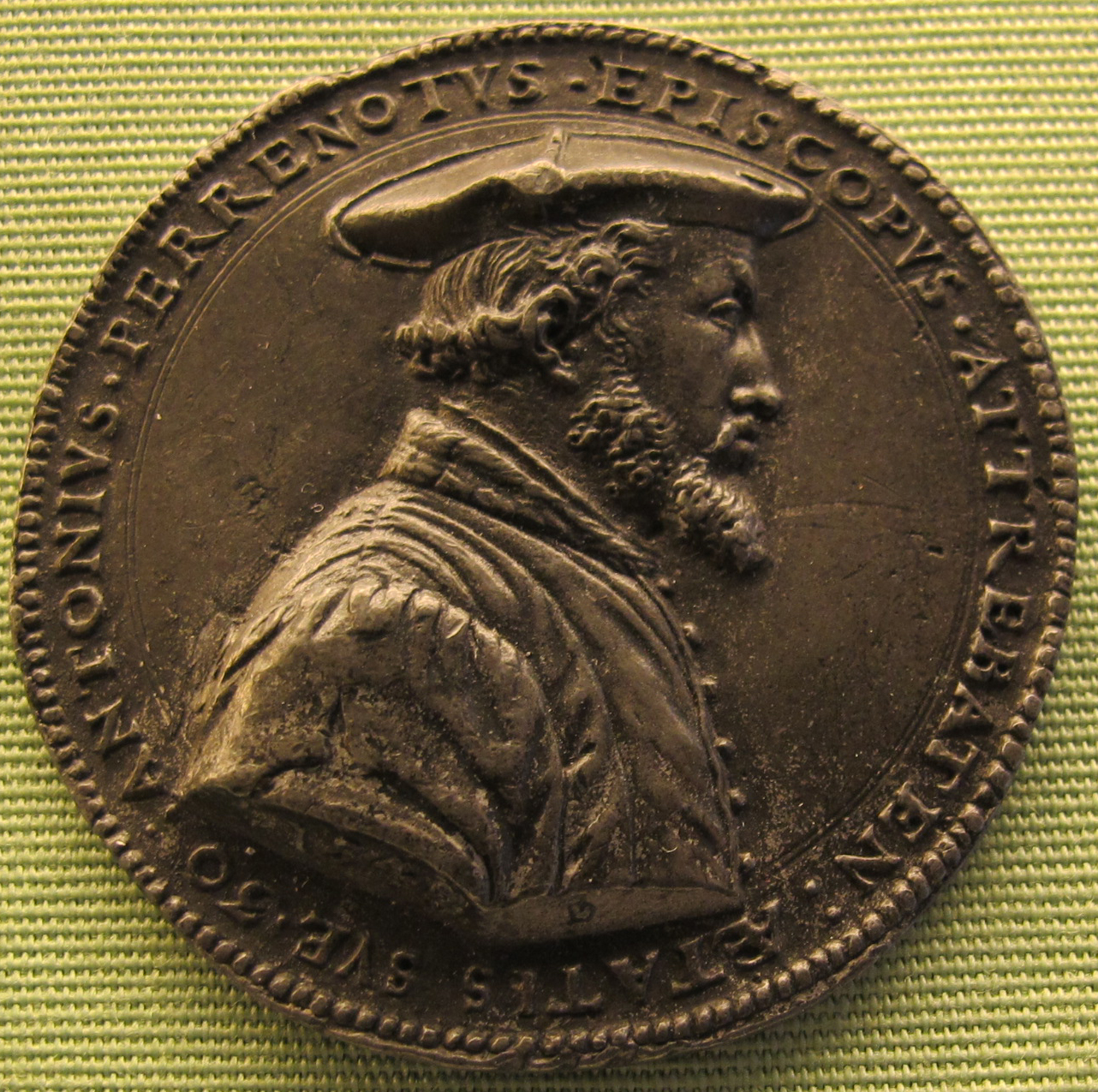 Antoine perrenot de granvelle, vescovo di arras, 1548